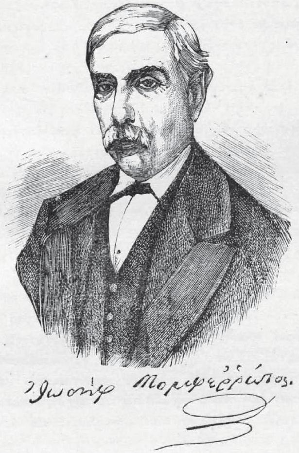 namhafte Griechische Persönlichkeit, 19. Jahrhundert